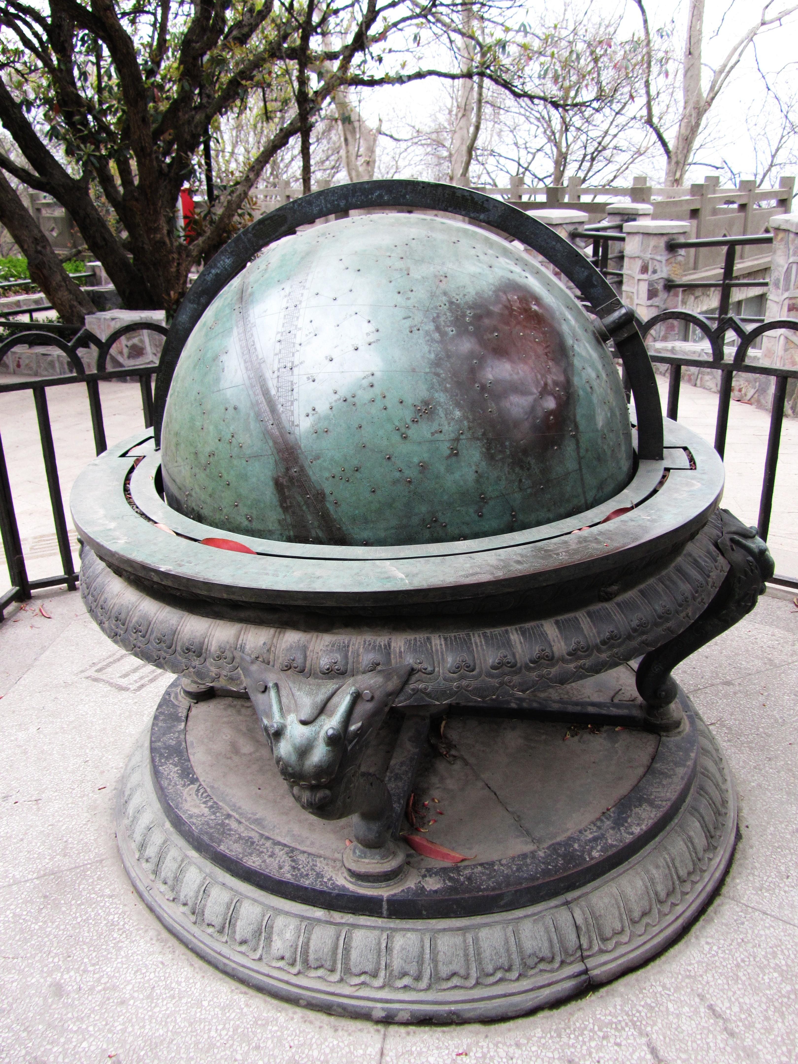 紫金山天文台陈列的古天文仪器天球仪，又名浑天仪、浑象，1903年制作。